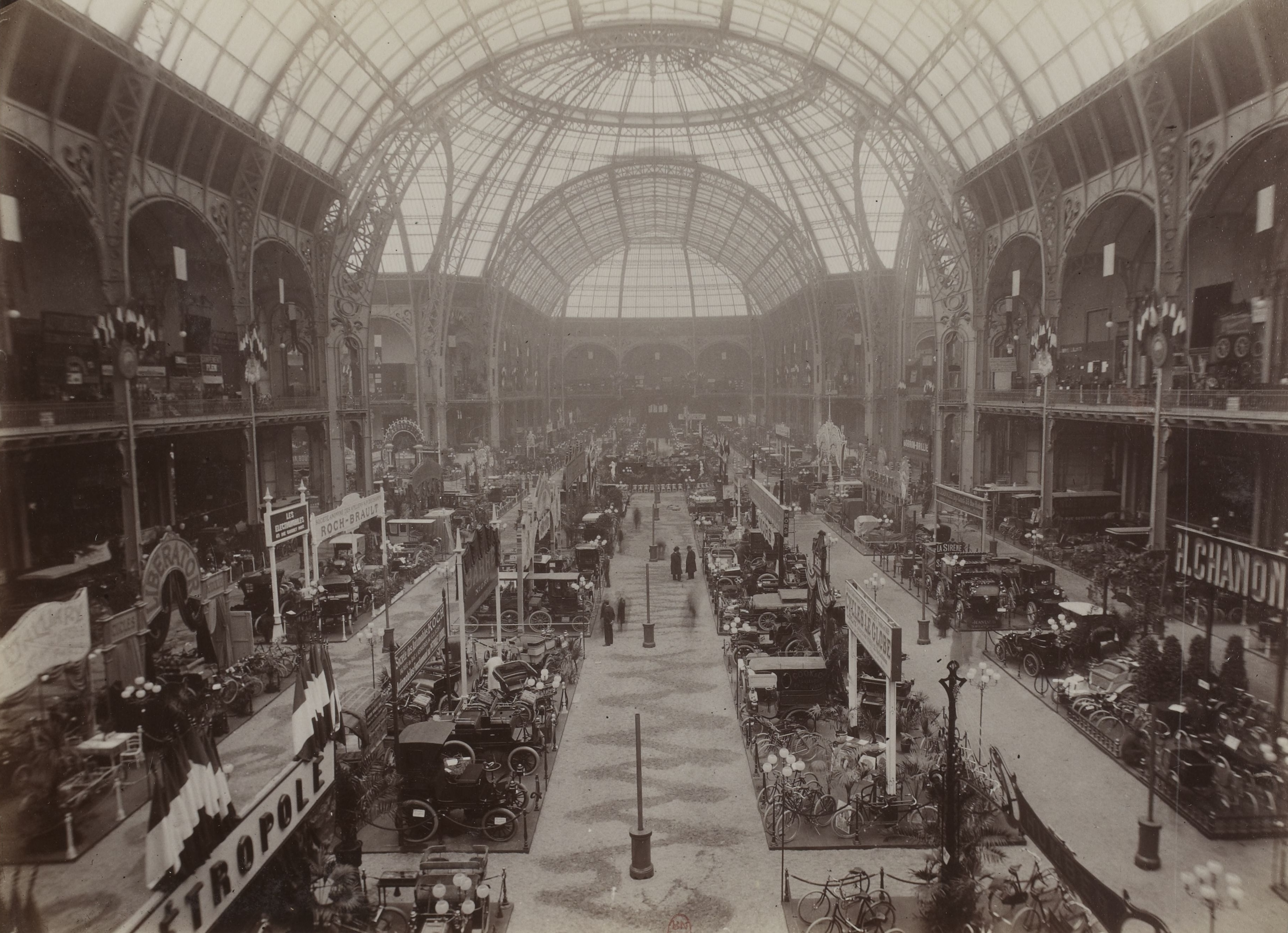 [Collection Jules Beau. Photographie sportive] : T. 15. Année 1901 / Jules Beau : F. 2v. [Salon de l' Automobile, du cycle et des sports, 25 janvier - 10 février 1901]